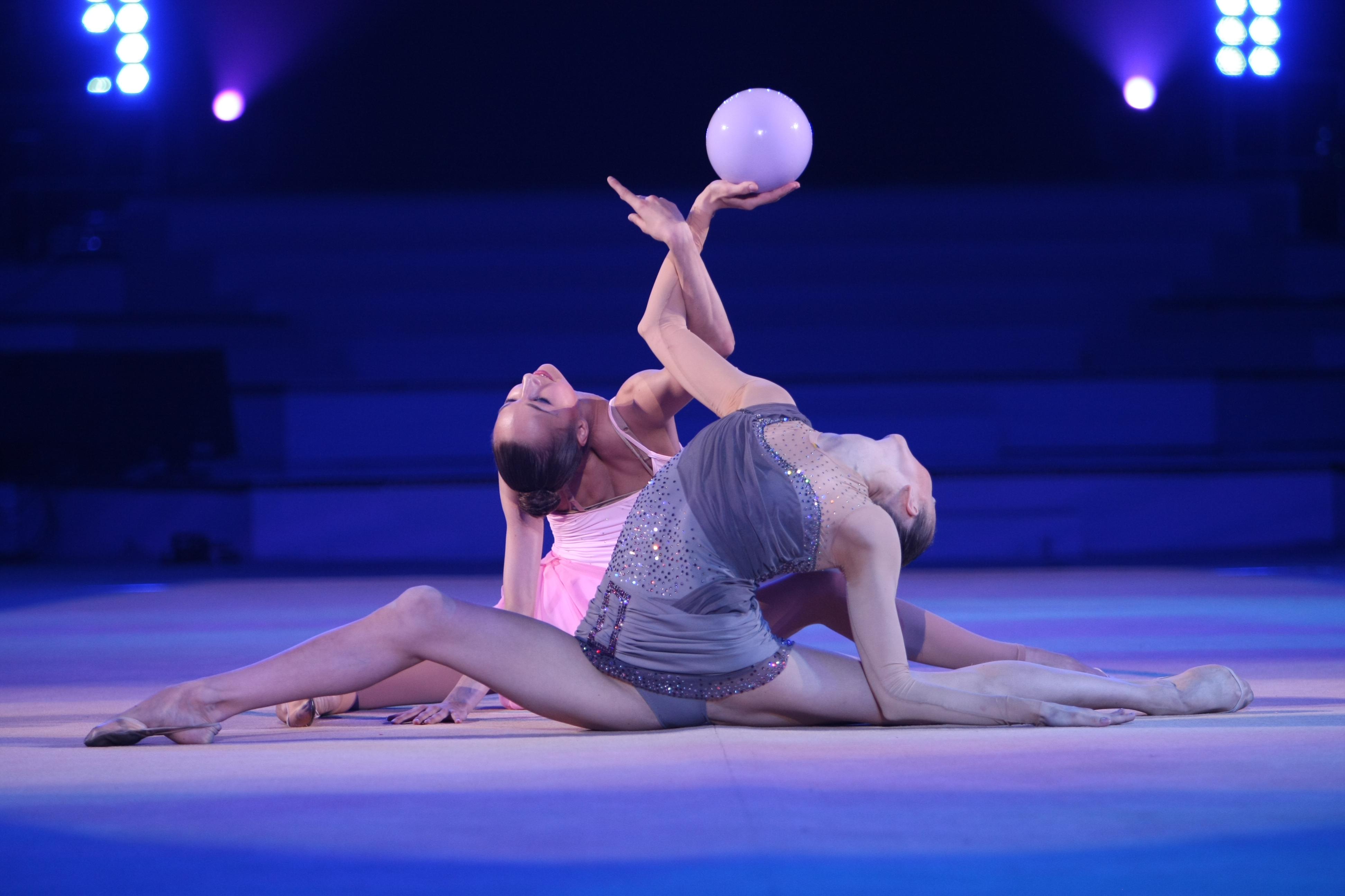 LG전자가 11일(土, 오후 3시), 12일(日, 오후 2시) 양일간 고려대학교 화정체육관 특설무대에서 국내 최초 리듬체조 갈라쇼인 ‘LG WHISEN Rhythmic All Stars 2011’ 행사를 개최했다. 사진은 11일 고려대학교 화정체육관 특설무대에서 열린 ‘LG WHISEN Rhythmic All Stars 2011’ 행사에서 LG ‘휘센’ 광고모델인 손연재(18세, 세종고) 선수를 비롯해 국내외 전•현역 리듬체조 스타들이 총출동해 멋진 리듬체조를 보여줬다.